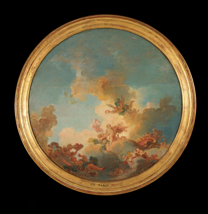 Œuvre faisant partie de la collection Pierre-Adrien Pâris